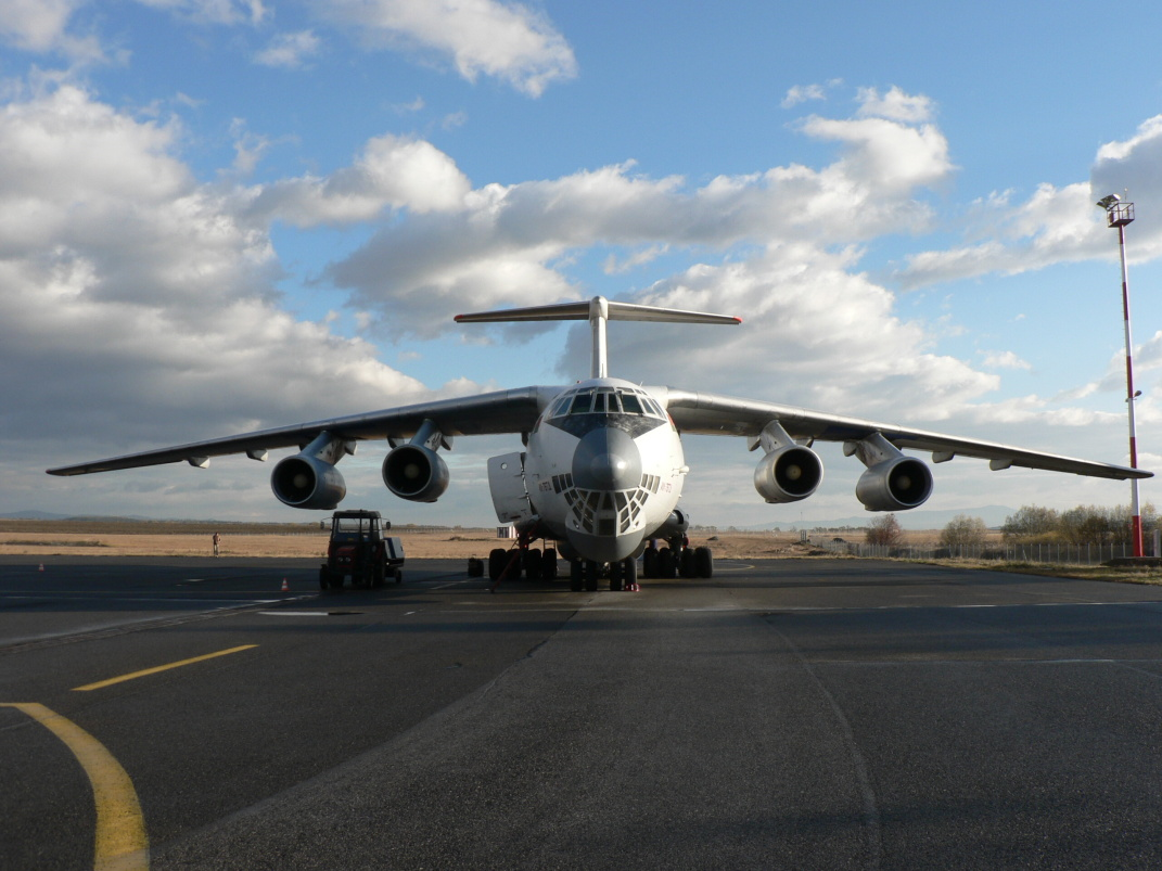 Nákladné lietadlo Il- 76 TD na letisku Poprad - Tatry